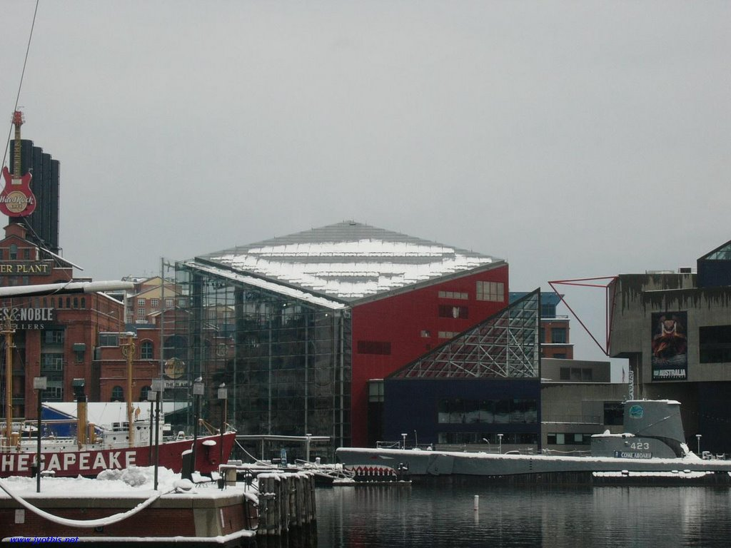 ബാള്ട്ടിമോറിലെ മഞ്ഞുകാല ദൃശ്യം - ഇന്നര് ഹാര്ബറില് നിന്ന്. കാണുന്നത് ബാള്ട്ടിമോര് അക്വേറിയം